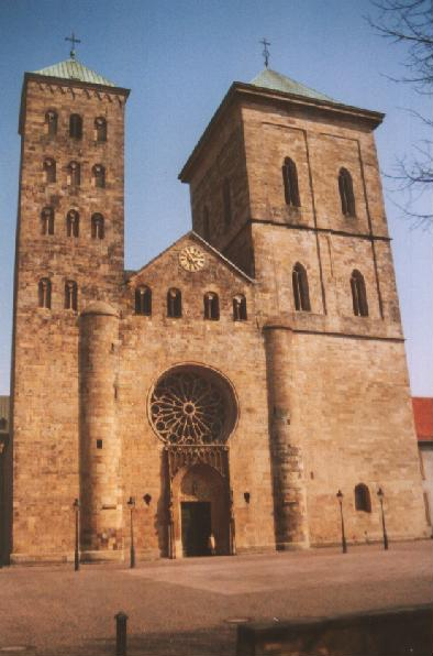 Osnabrücker Dom, Ansicht von Westen Fotografiert im April 2004 Fotograf: Tebdi